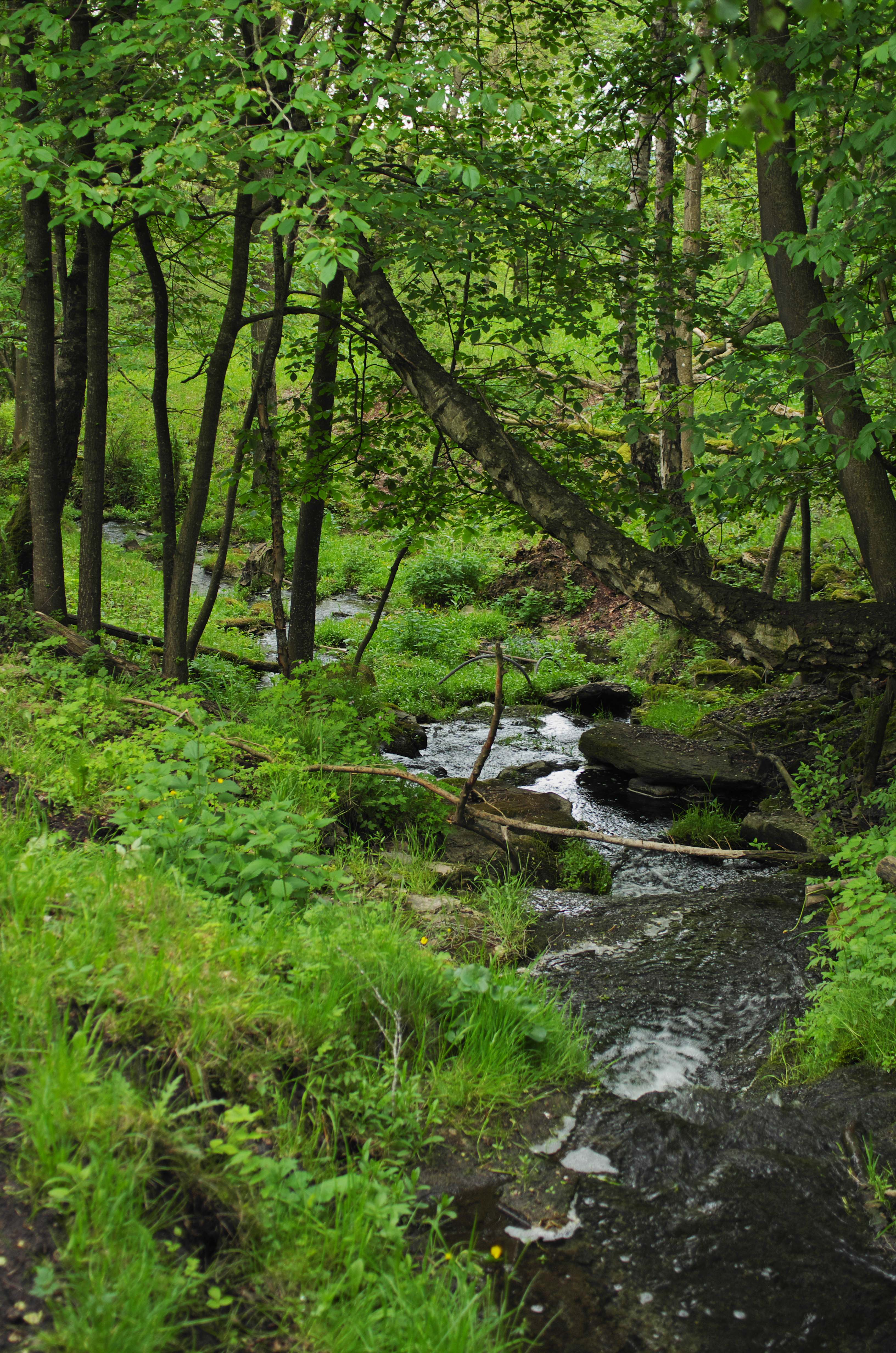 Naturreservatet Djupadalen i Karleby socken i Falköpingskommun i Västergötland i Sverige.